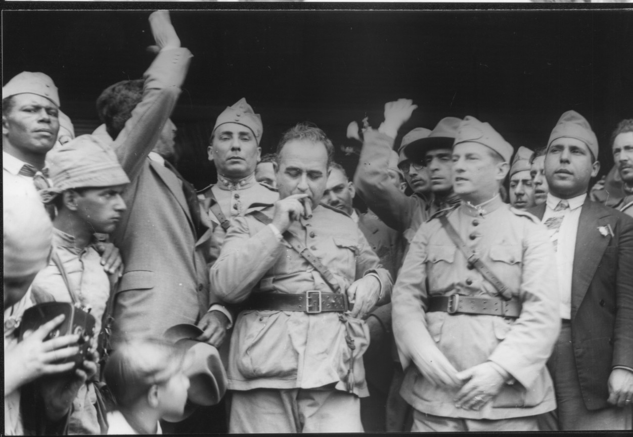 Cena da Revolução de 1930 (ao centro Getúlio Vargas) fotografada por Claro Jansson.